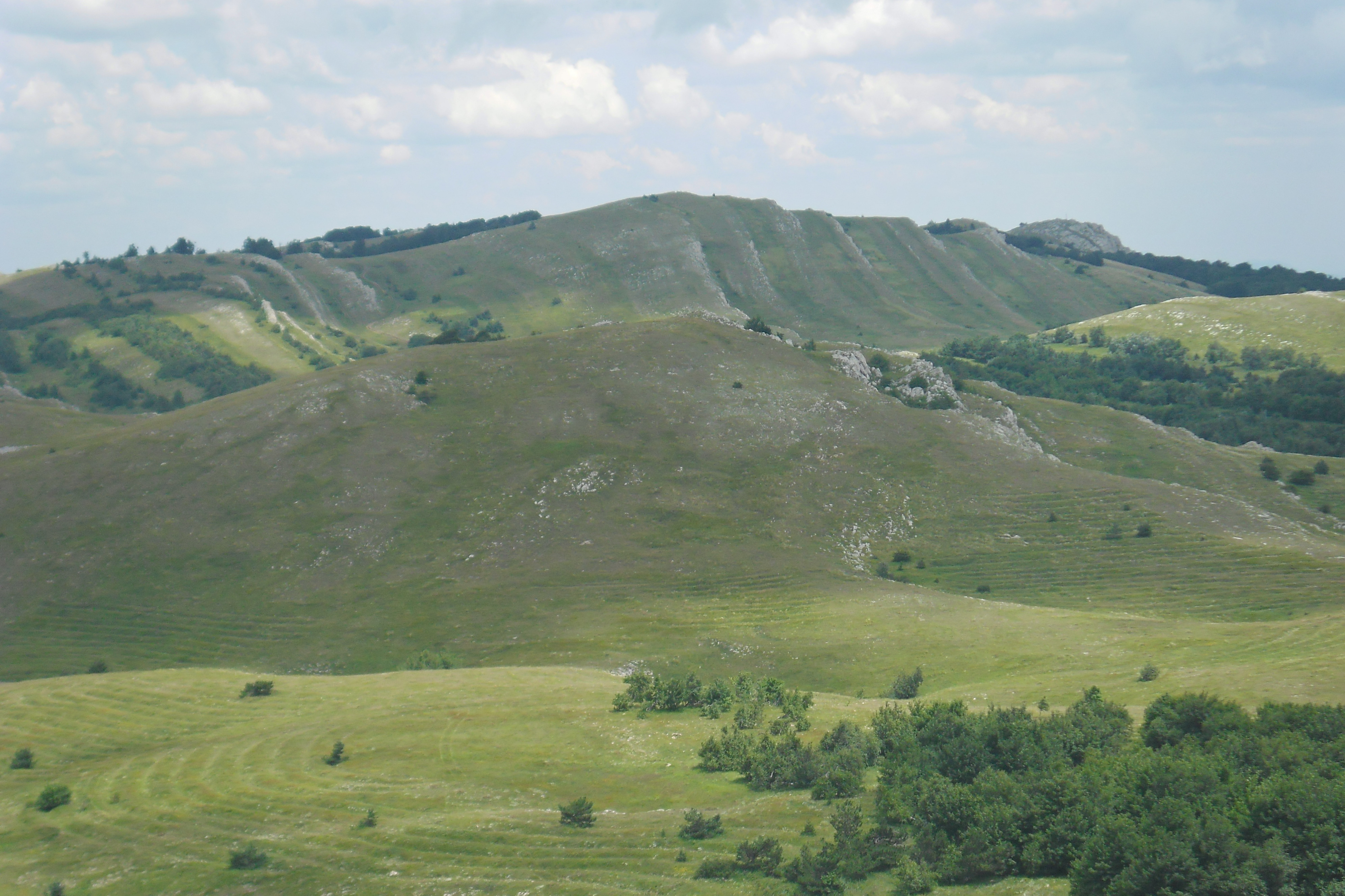 Фото